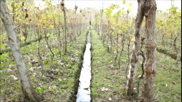 Foto de un Canal de riego para Viñedo en Villa Dominico donde se produce el famoso vino de la costa. En la fotografÍa se observaun viña ubicada en la costa de Villa Domìnico, Avellaneda. El sistema de riego funciona por canales artificiales, los mismos atraviesan en forma paralela la zona cultivada de viña, los canales están pensados para no provocar daños al ambiente y para que se gaste la menor cantidad de agua possible. Están estrechamente vinculados a las caracteristicas del terreno, generalmente siguen aproximadamente las curvas del nivel